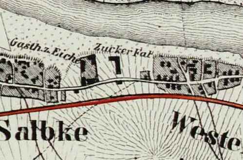 Ausschnitt aus der Karte von Albrecht Platt, Bereich zwischen Salbke und Westerhüsen, in der Mitte des Ausschnitts die 1838 gegründete Zuckerfabrik Gebrüder Schmidt und Coqui, Karte nicht eingenordet, oben (Osten) die Elbe, links (Norden) Salbke, rechts (Süden) Westerhüsen